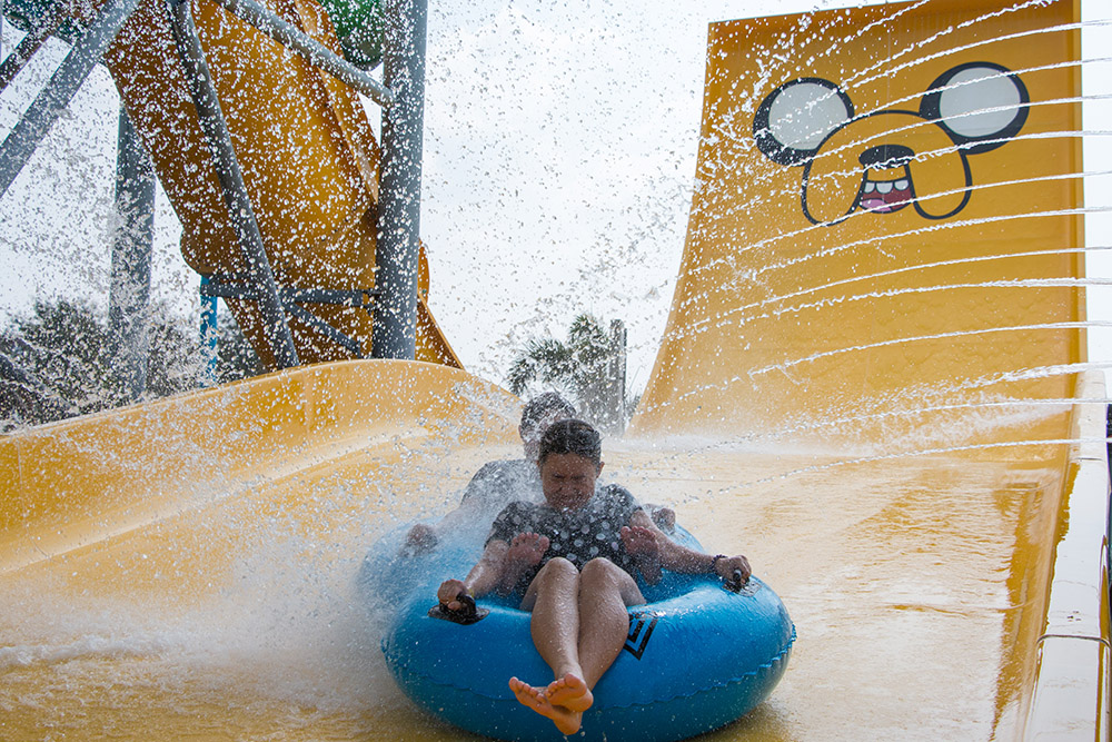 เจคจั๊มพ์